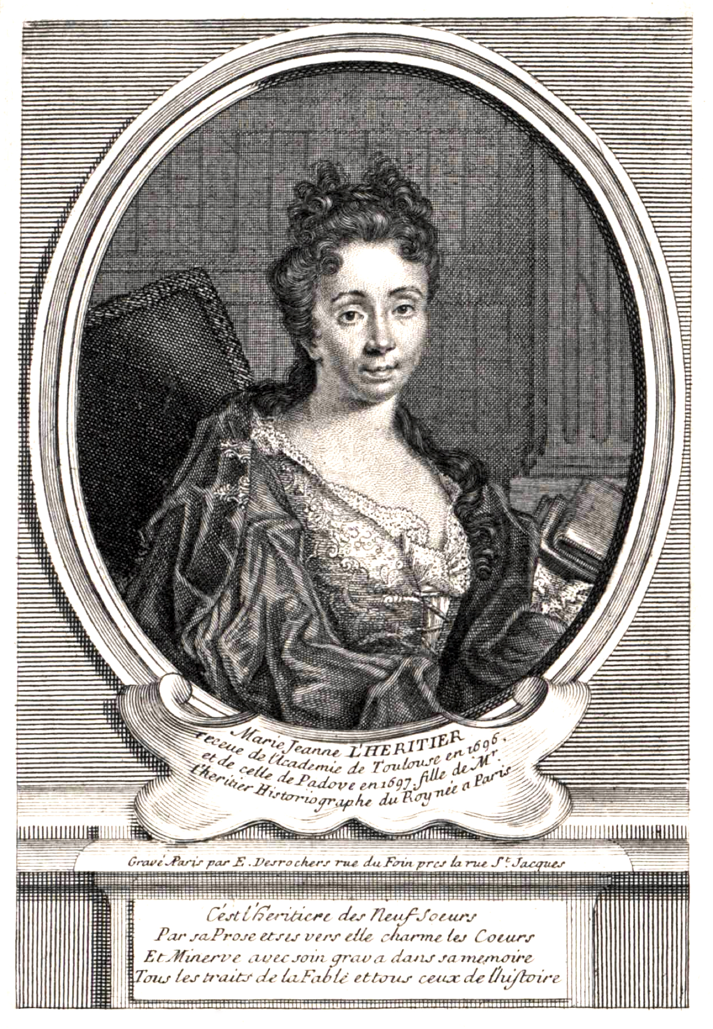 Portrait of Marie-Jeanne L'Héritier de Villandon (1664–1734)